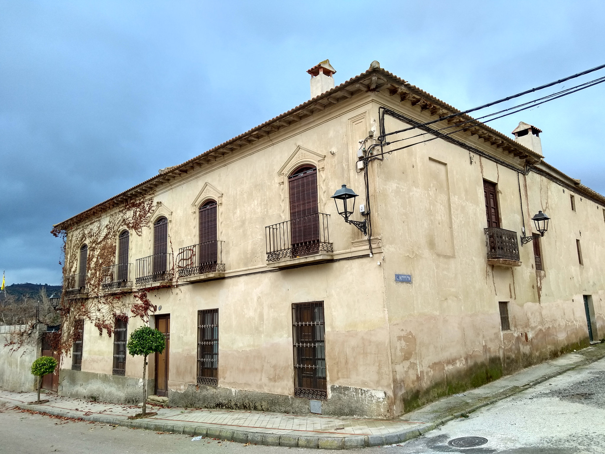 Edificio diseñado por Juan Monserrat, posiblemente correspondiente a una posada originalmente.